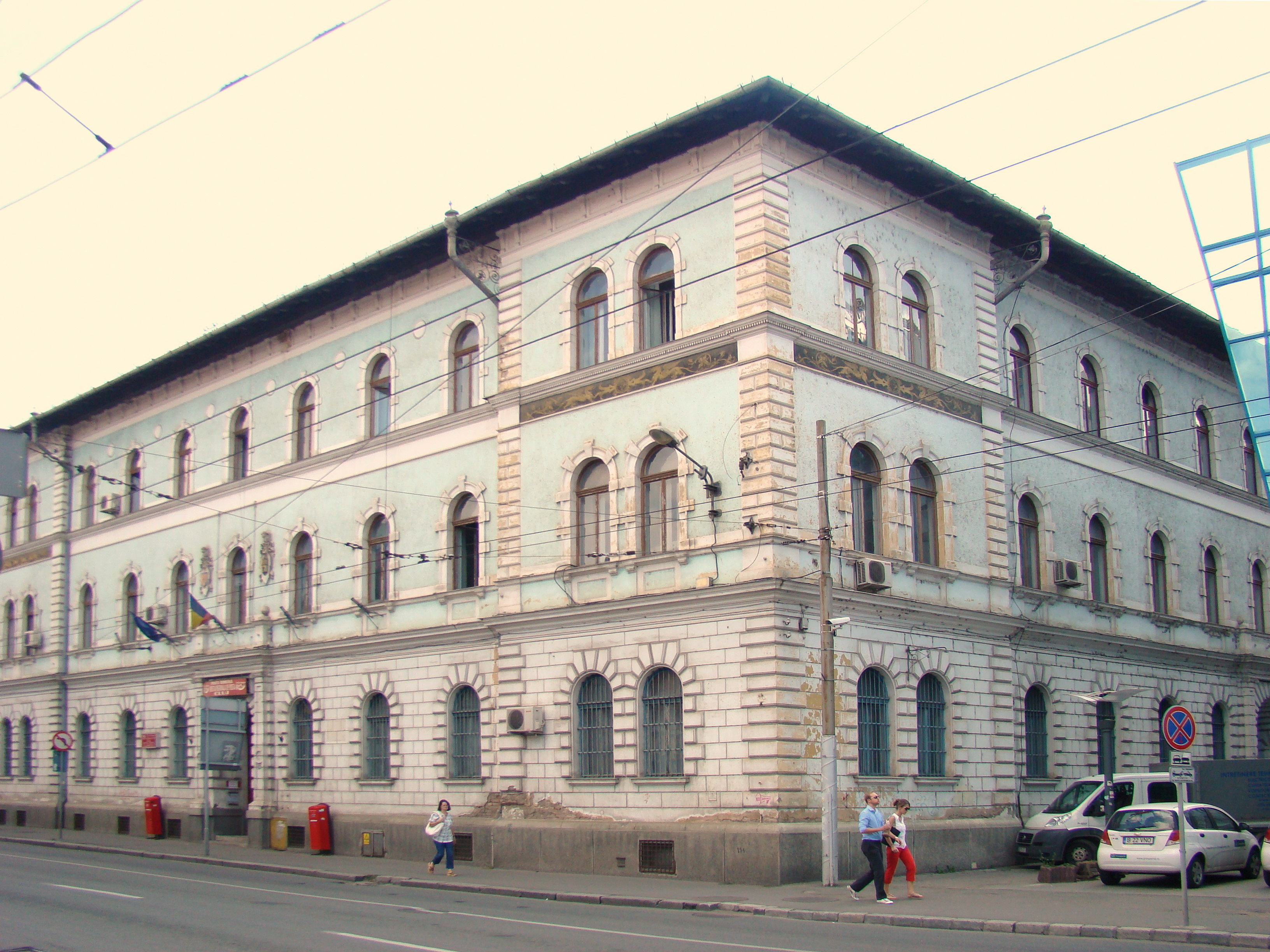 Clădire monument istoric, str. Regele Ferdinand nr.33